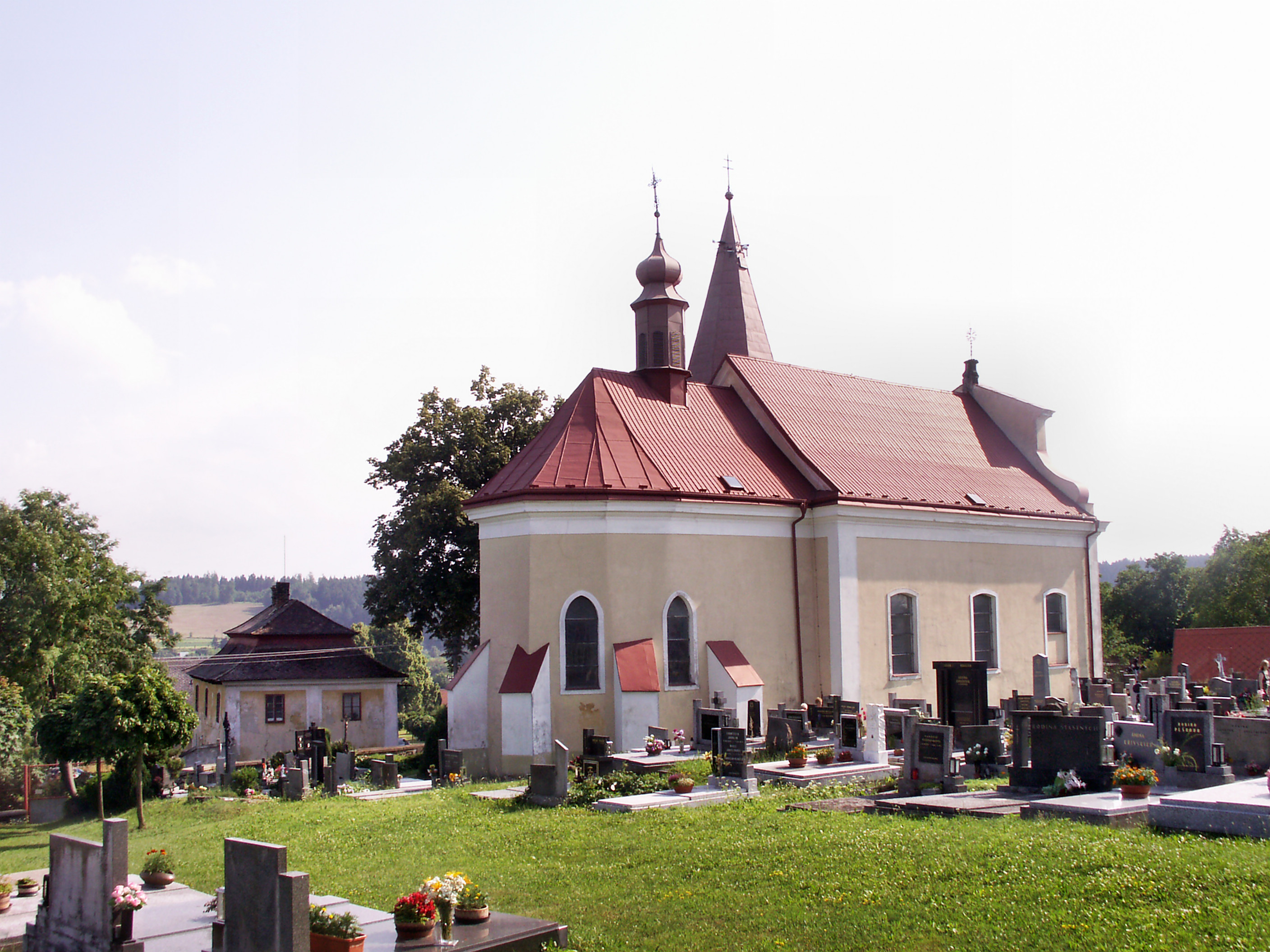 Uhelná Příbram, okres Havlíčkův Brod, kostel archanděla Michaela